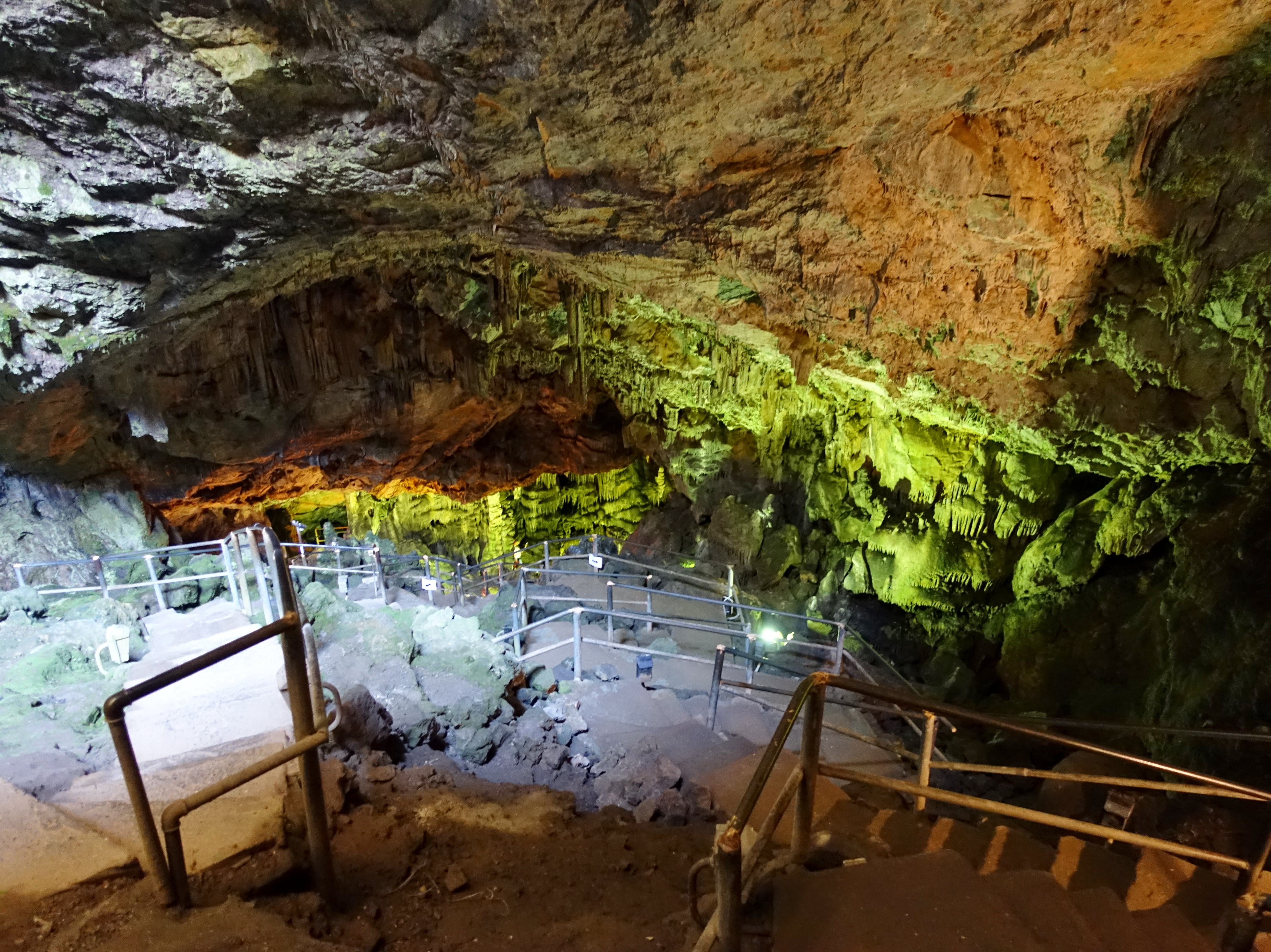 Diktäische Grotte (Δικταίον Αντρον) bei Psychro (Ψυχρό), Regionalbezirk Lassithi, Kreta, Griechenland